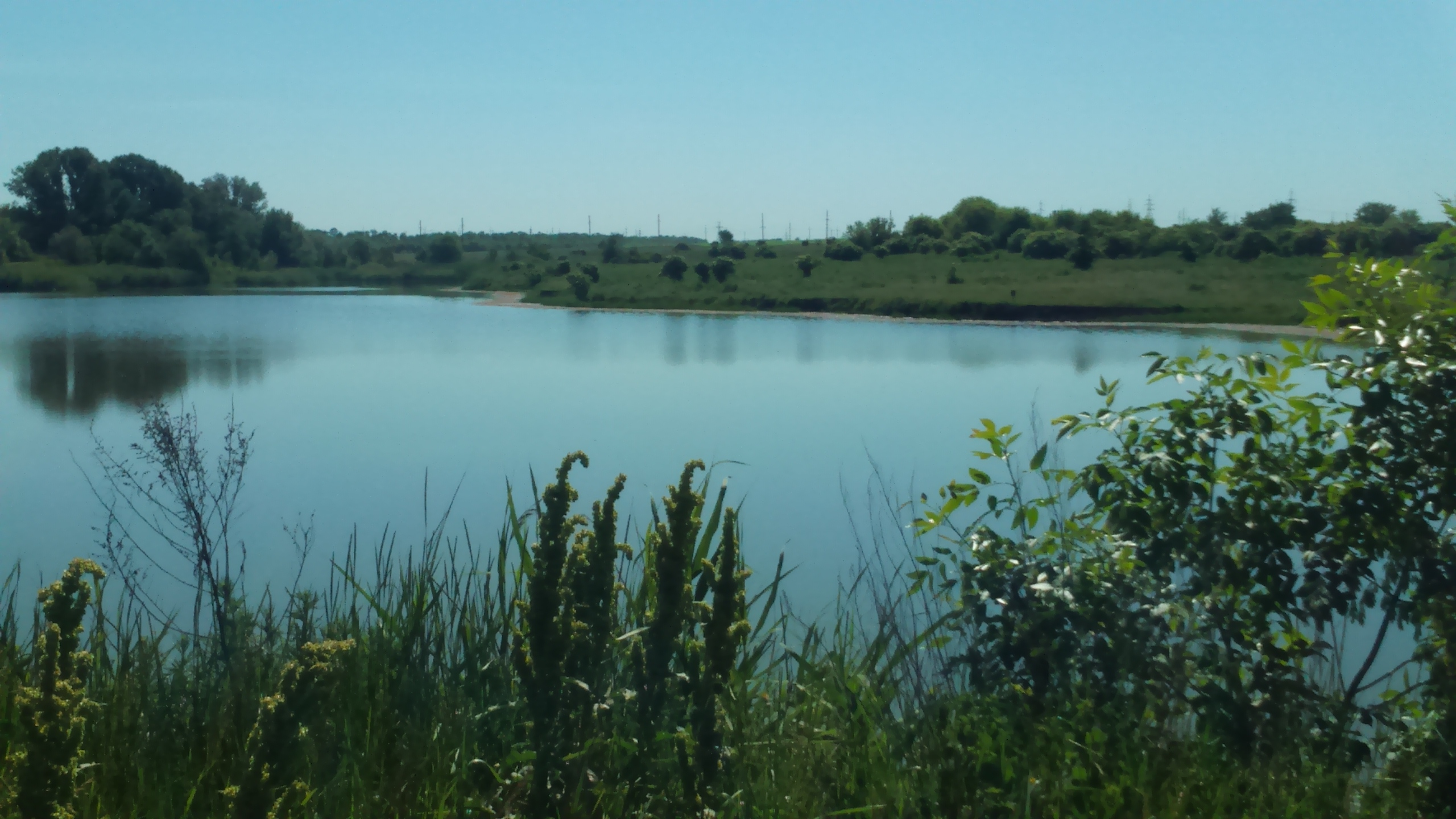 Світле — селище в Україні, Добропільському районі Донецької області, над річкою Водяна.